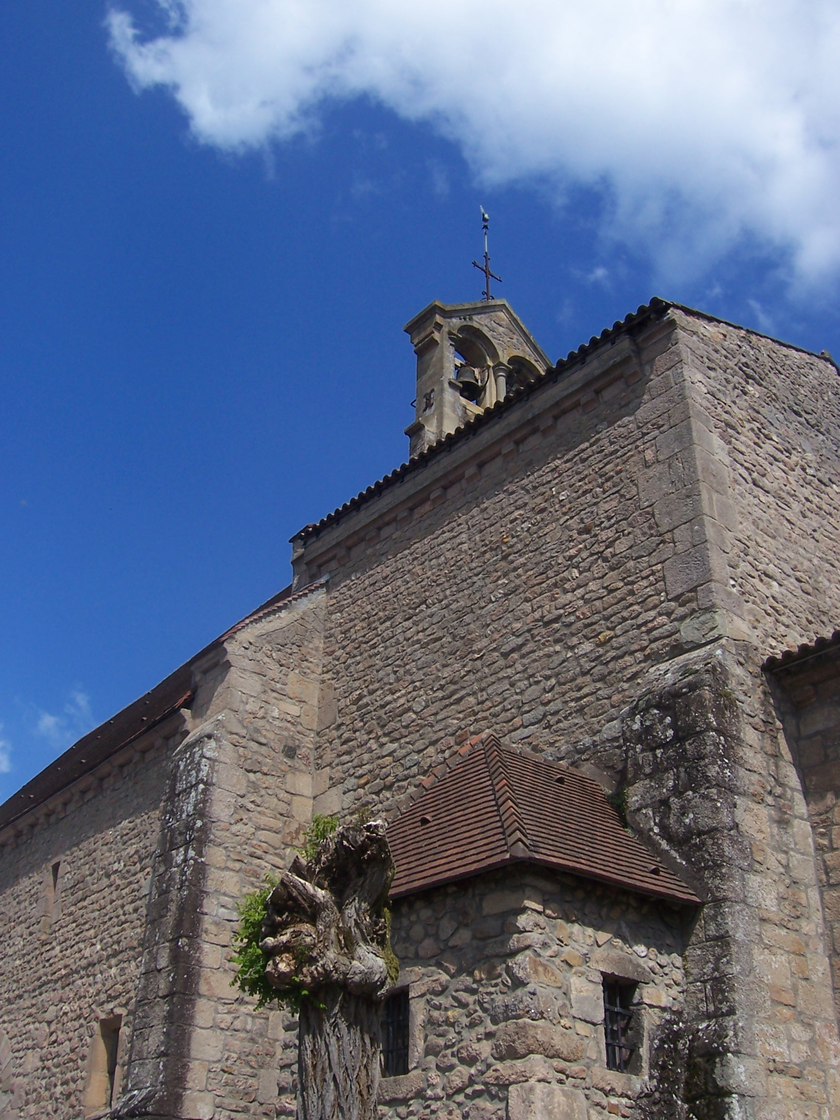 Eglise de Mesvres